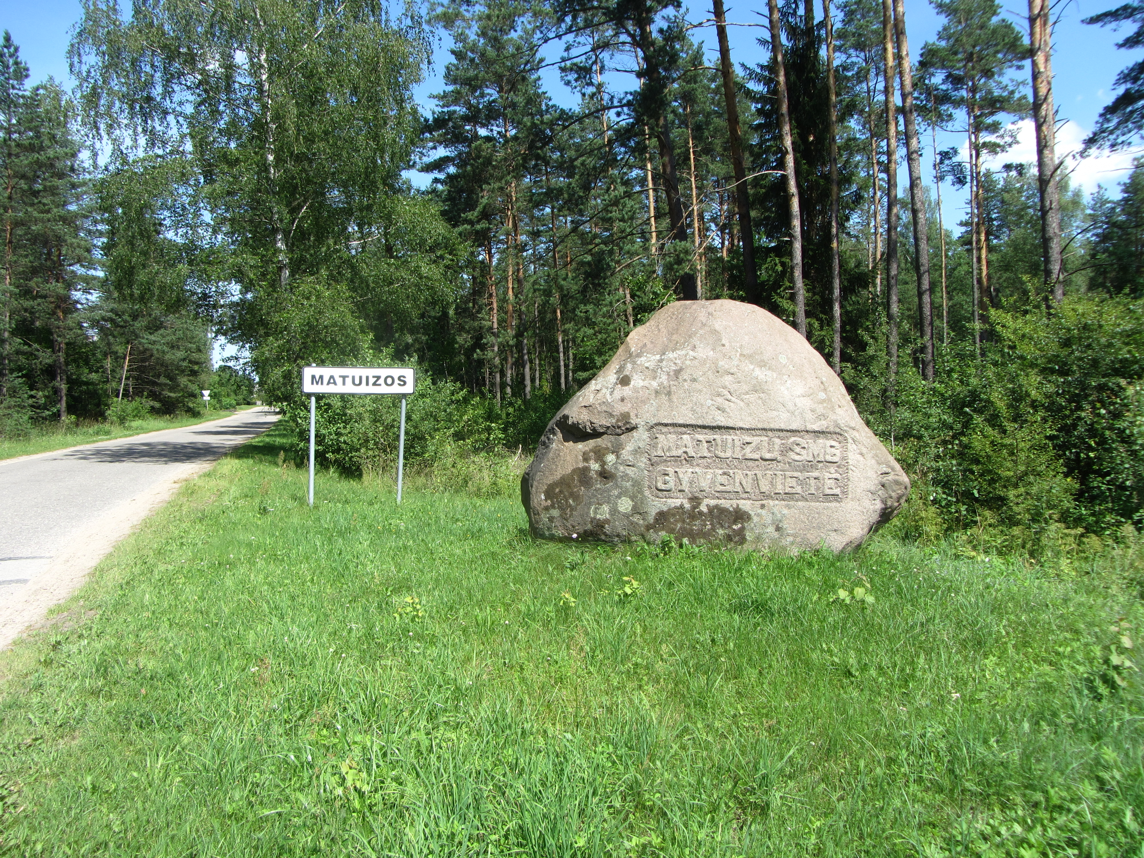 Matuizos, Lithuania